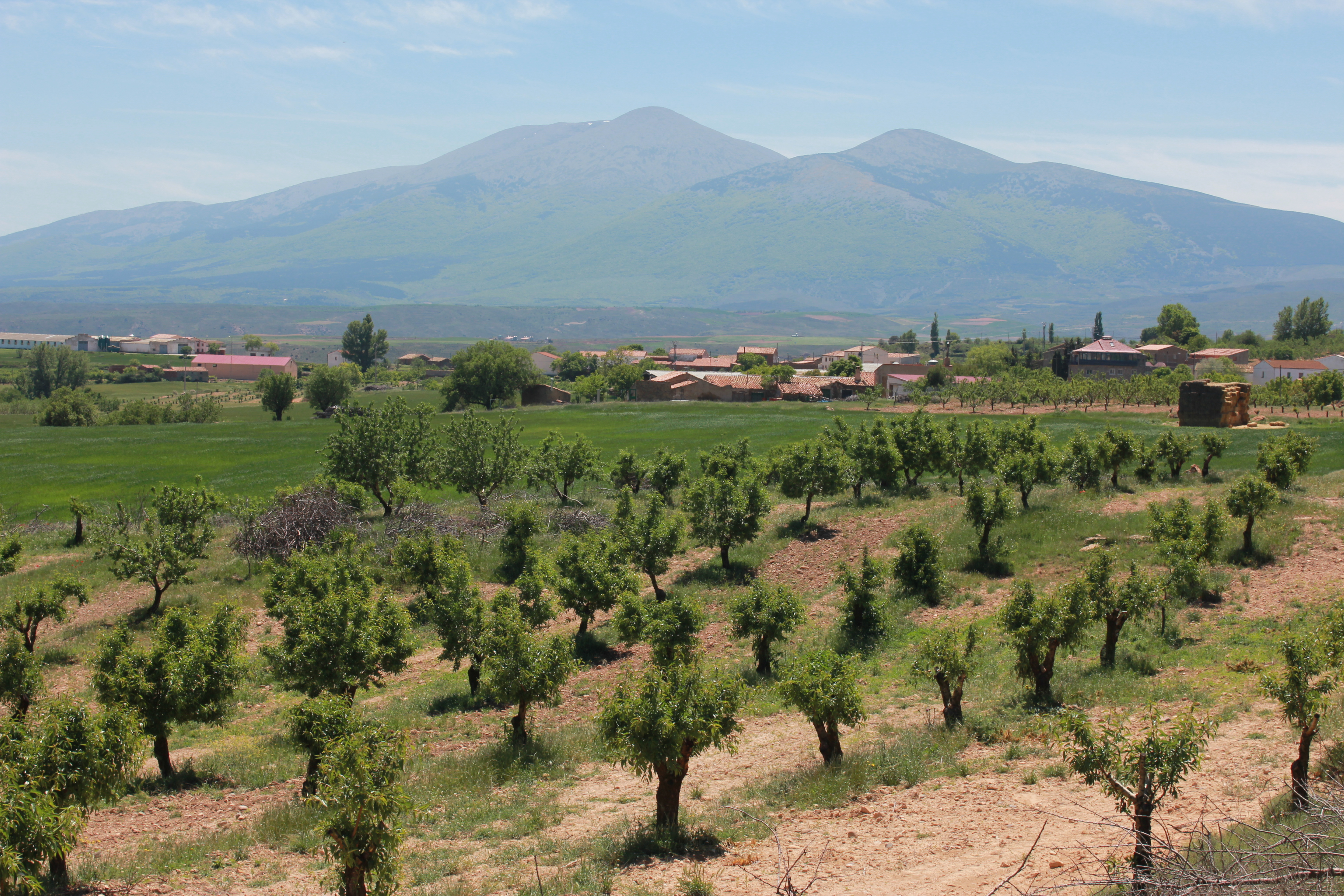 Sierra del Moncayo This is a photography of a Special Area of Conservation in Spain with the ID: ES4170119. Natura2000 entry, EEA entry